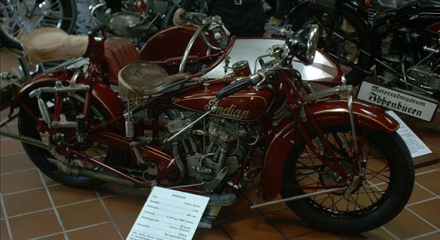 Indian Gespann 1928, Motorradmuseum Ibbenbüren